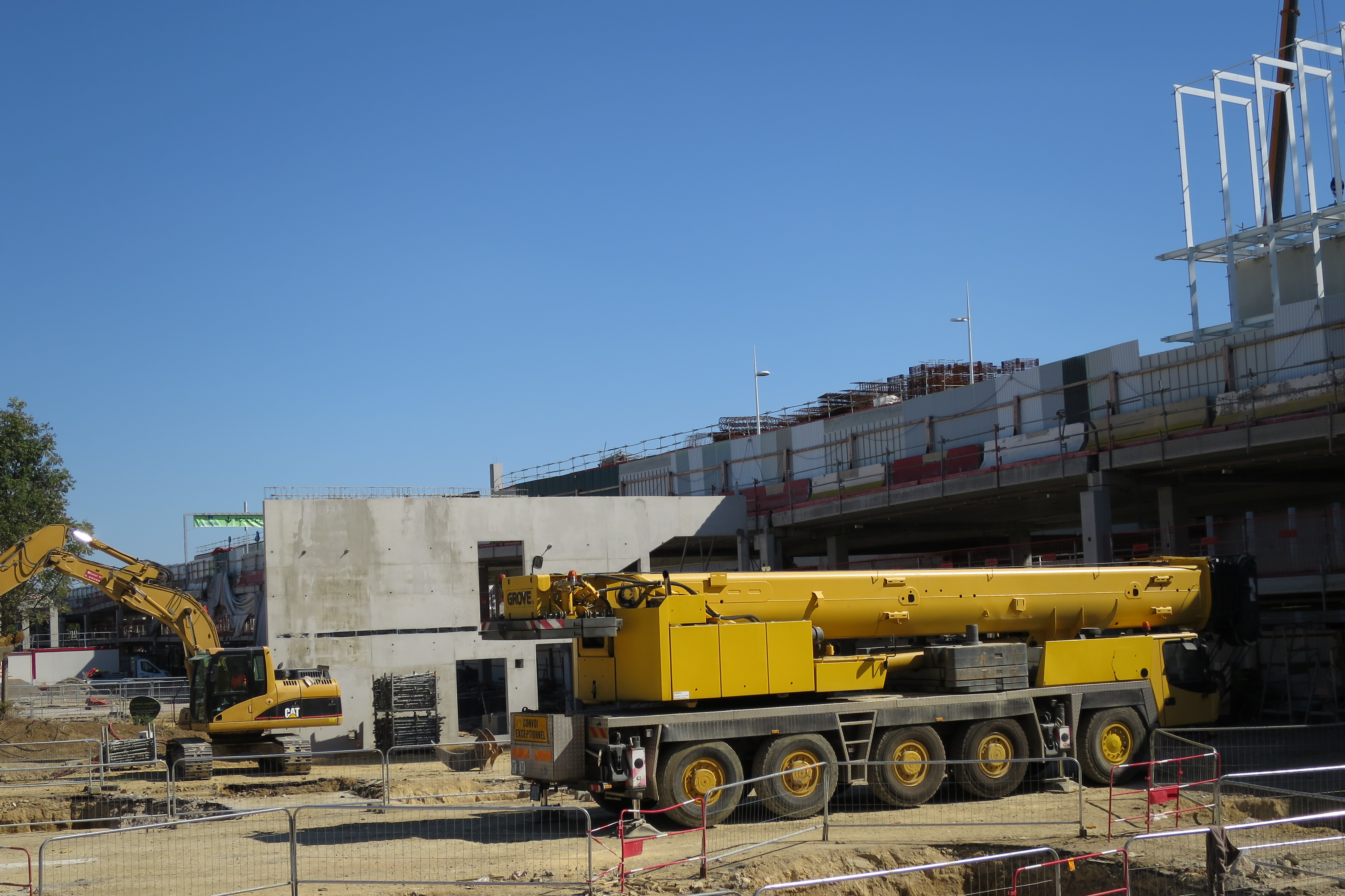 Travaux d'extension de Carré-Sénart (Lieusaint - Seine-et-Marne - France)